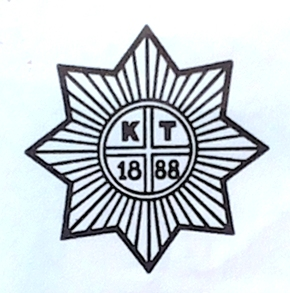 Selskapets logo